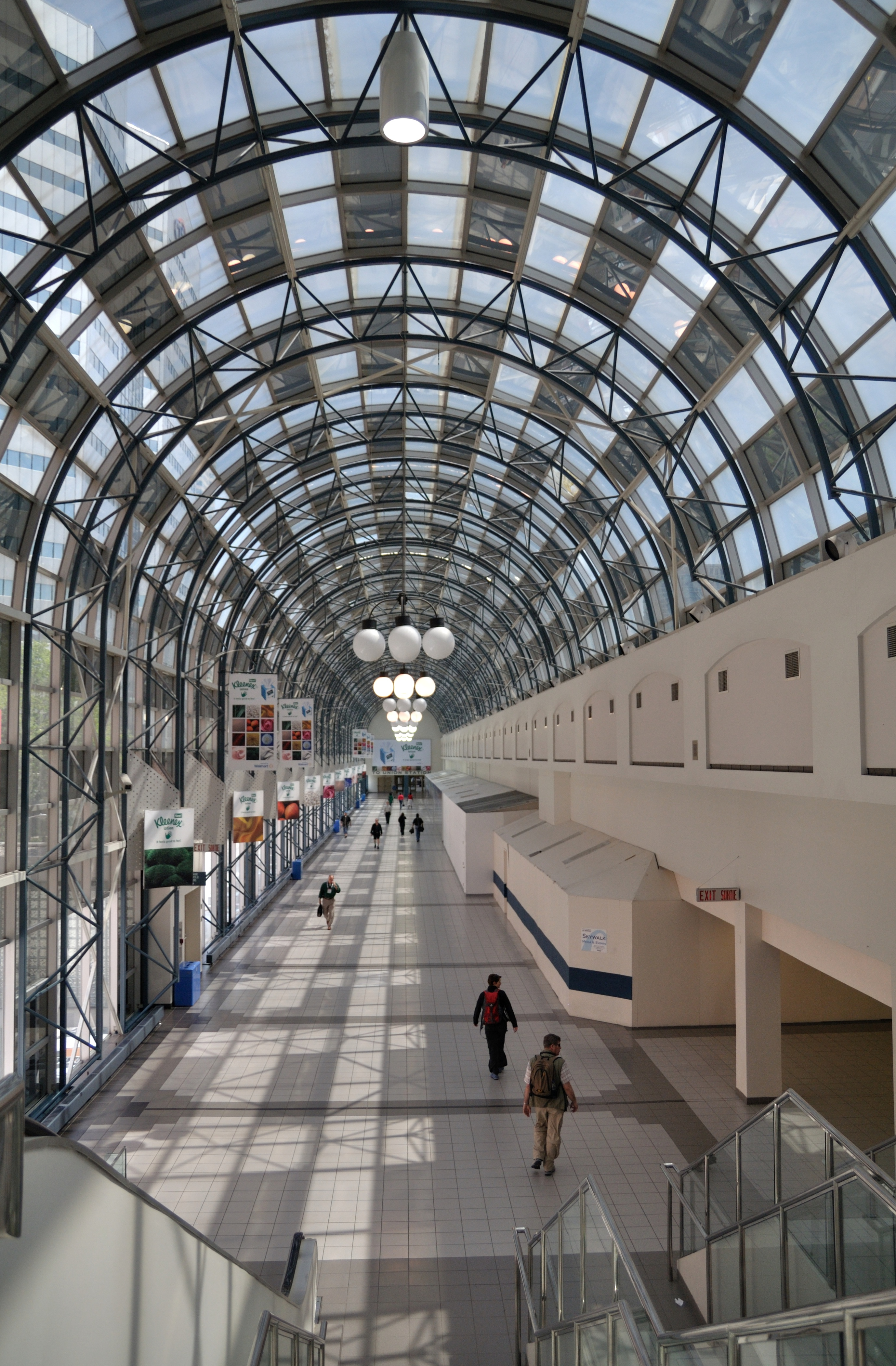 Toronto: Skywalk an der Union Station